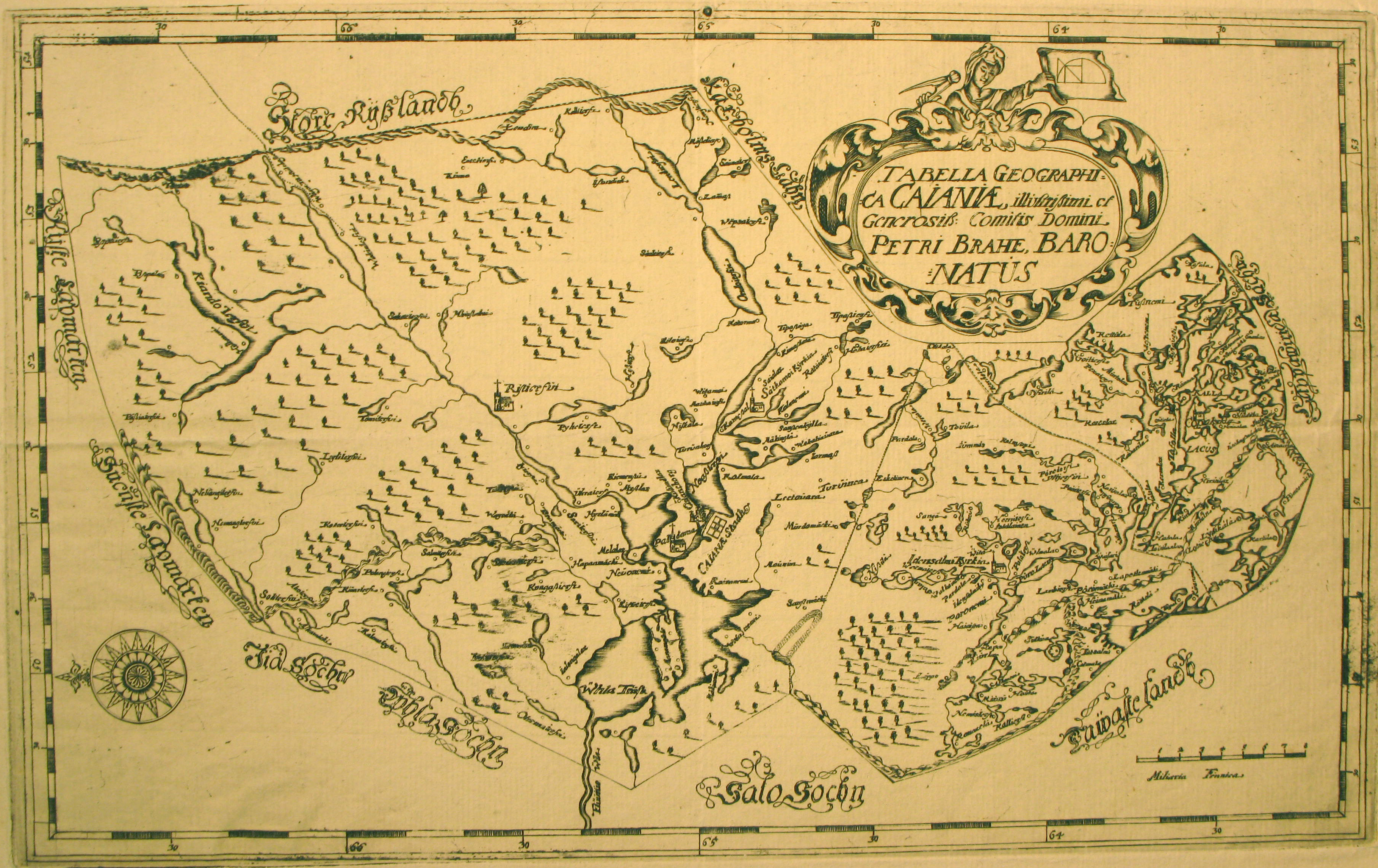 Pietari Brahen tilauksesta valmistettu kartta Kajaanin vapaaherrakunnan alueesta 1650-luvun alusta.